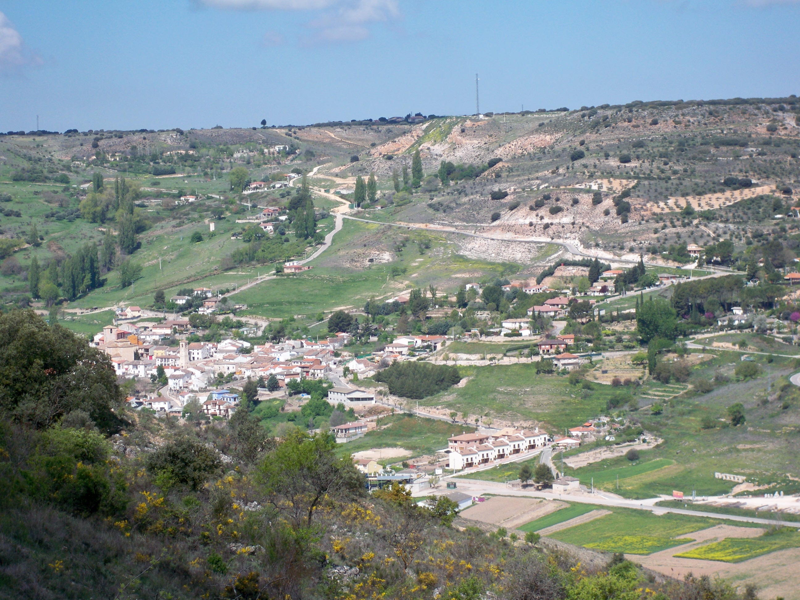 Vista del pueblo desde la Peña de los Milánganos